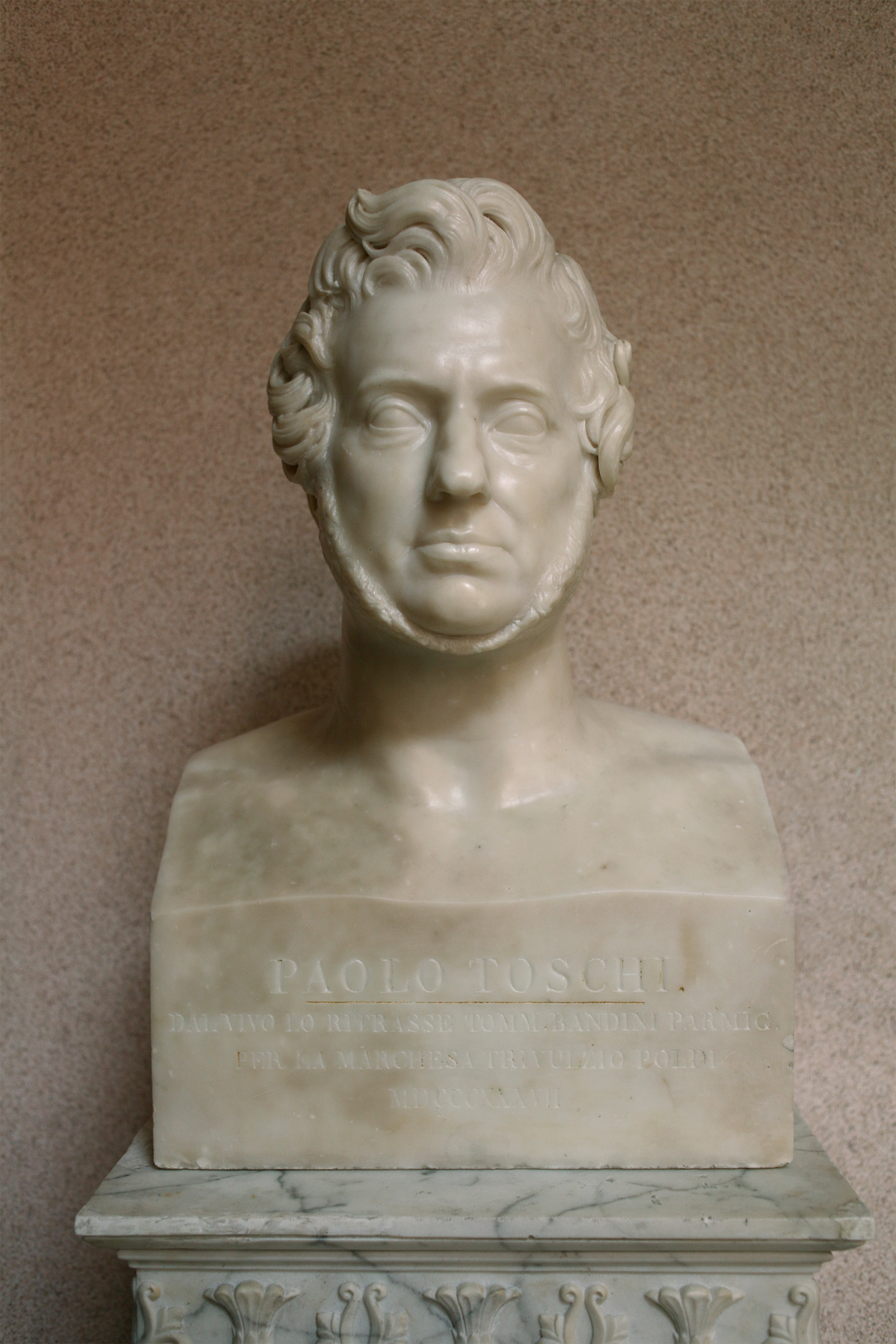 Tommaso Bandini (1807-1849) "Busto di Paolo Toschi" (1837); marmo, Collezione Gian Giacomo Poldi Pezzoli, Milano. Restauro offerto da Canio Mazzaro in ricordo dei genitori Michele e Rosa Mazzaro (2014). Nella didascalia sul basamento: «PAOLO TOSCHI. DAL VIVO LO RITRASSE TOMM. BANDINI PARMIG. PER LA MARCHESA TRIVULZIO POLDI MCCCCXXXVII»